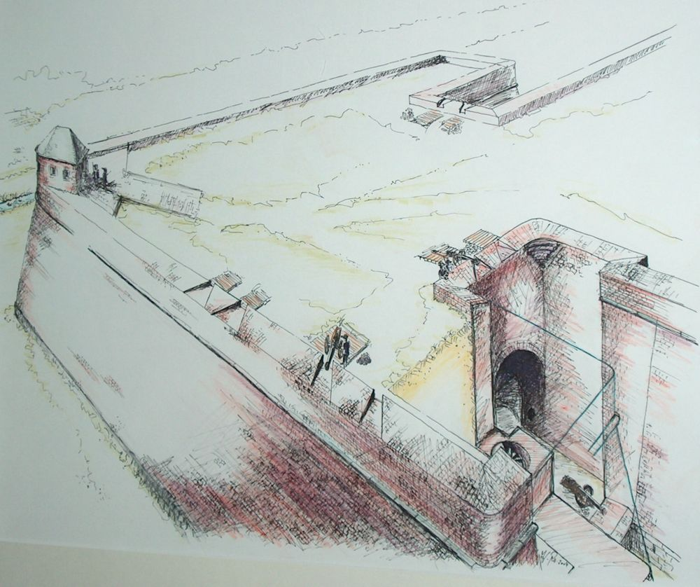 Darstellung einer Bastion im Zustand kurz nach der Fertigstellung